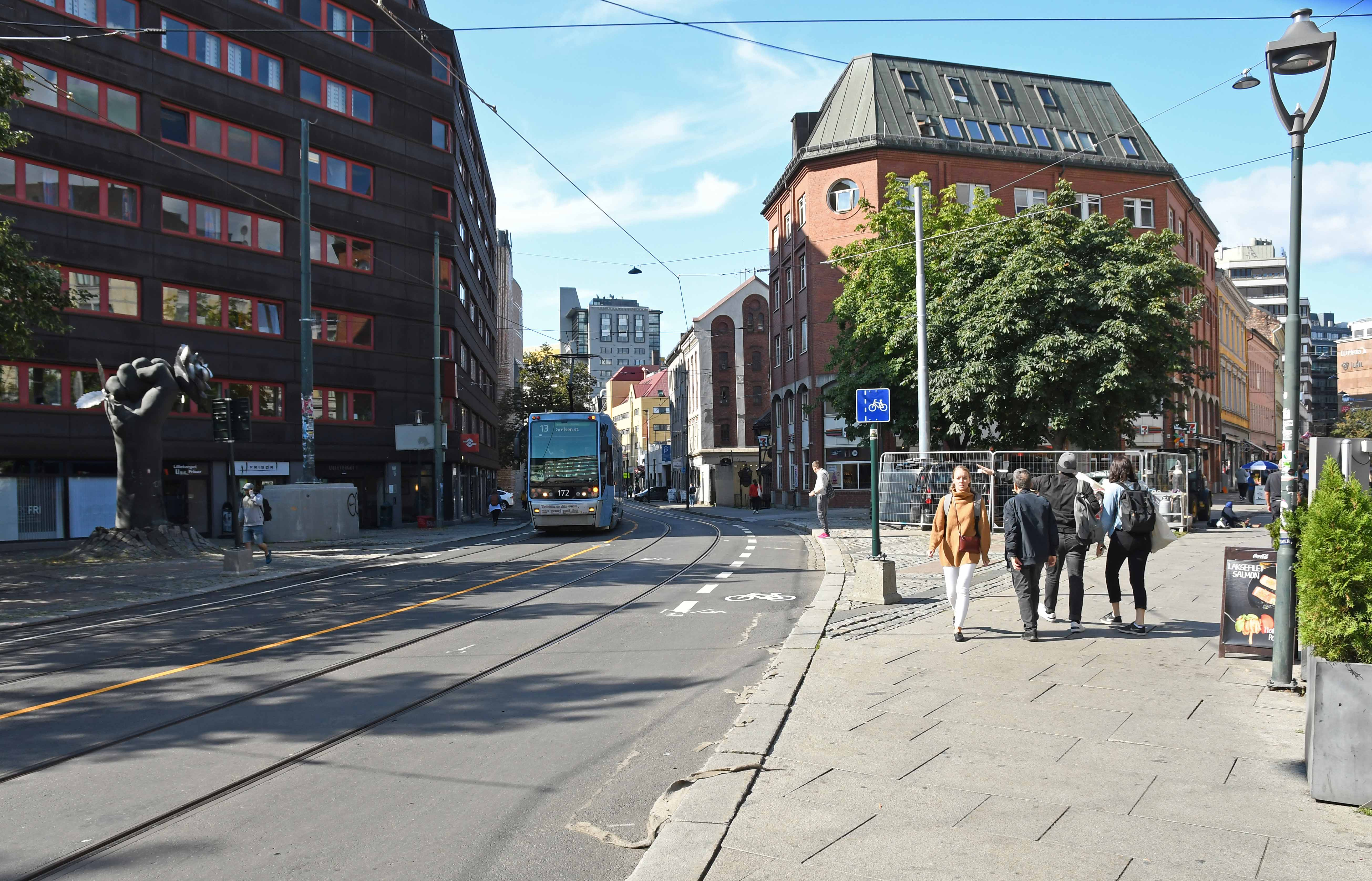 Lilletorget med trikk, erstatningslinje for Storgata fra 2.9.2019, skal tas bort i 2021 når oppgraderingen av Storgata er ferdig. Stenersgata midt i bildet, trikken går videre til Christian Kroghs gate, der holdeplassen Lilletorget ligger.